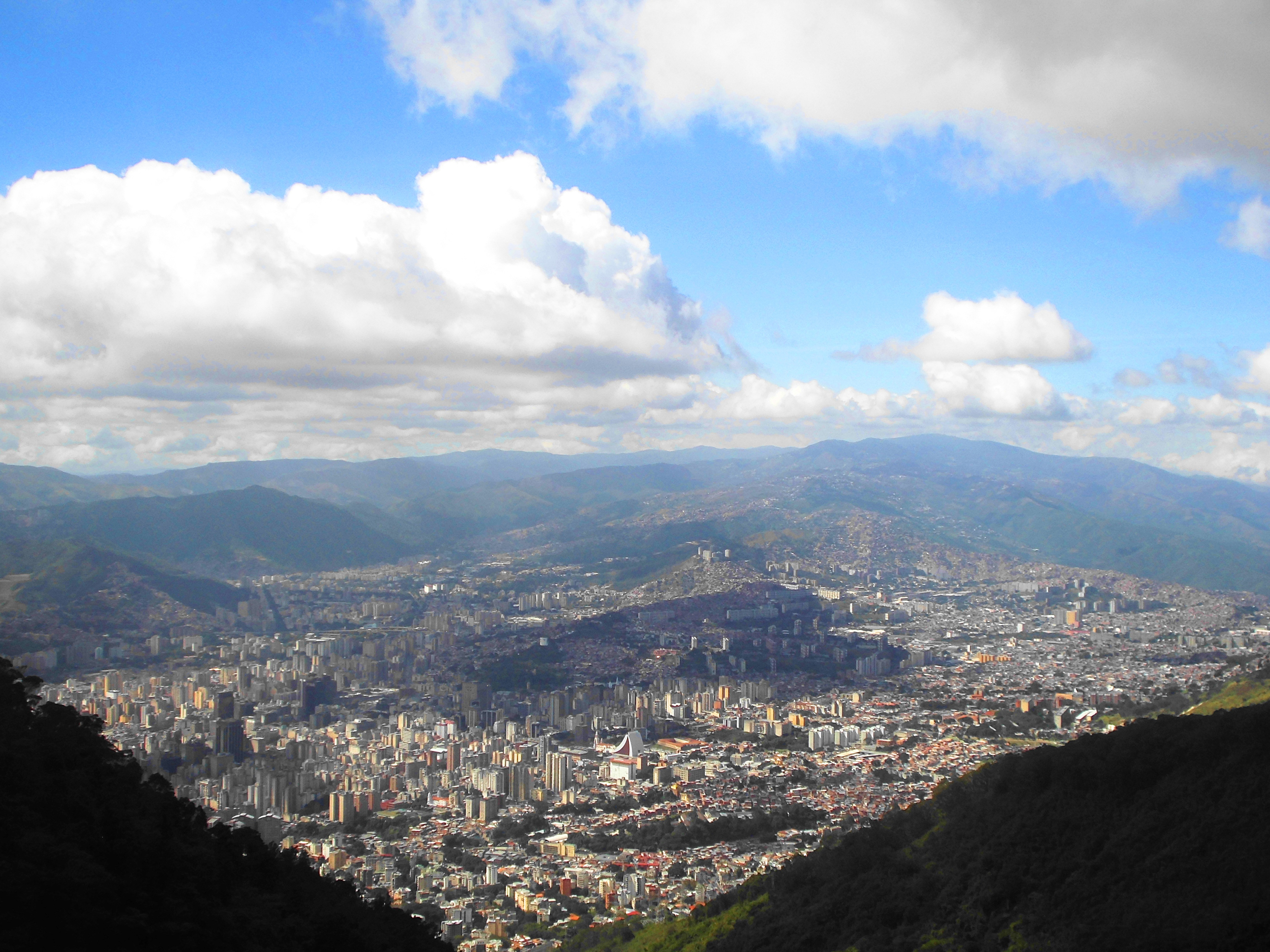 Vista desde el cerro el Ávila hacia la parte central y oeste de Caracas